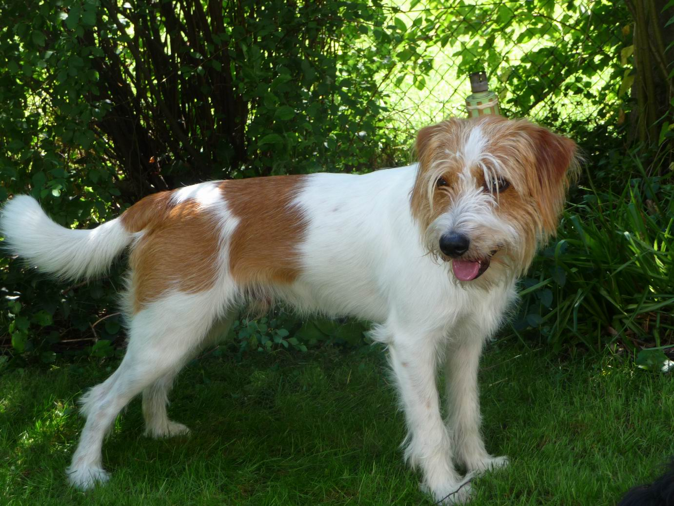 Kromfohrländer, rauhaar